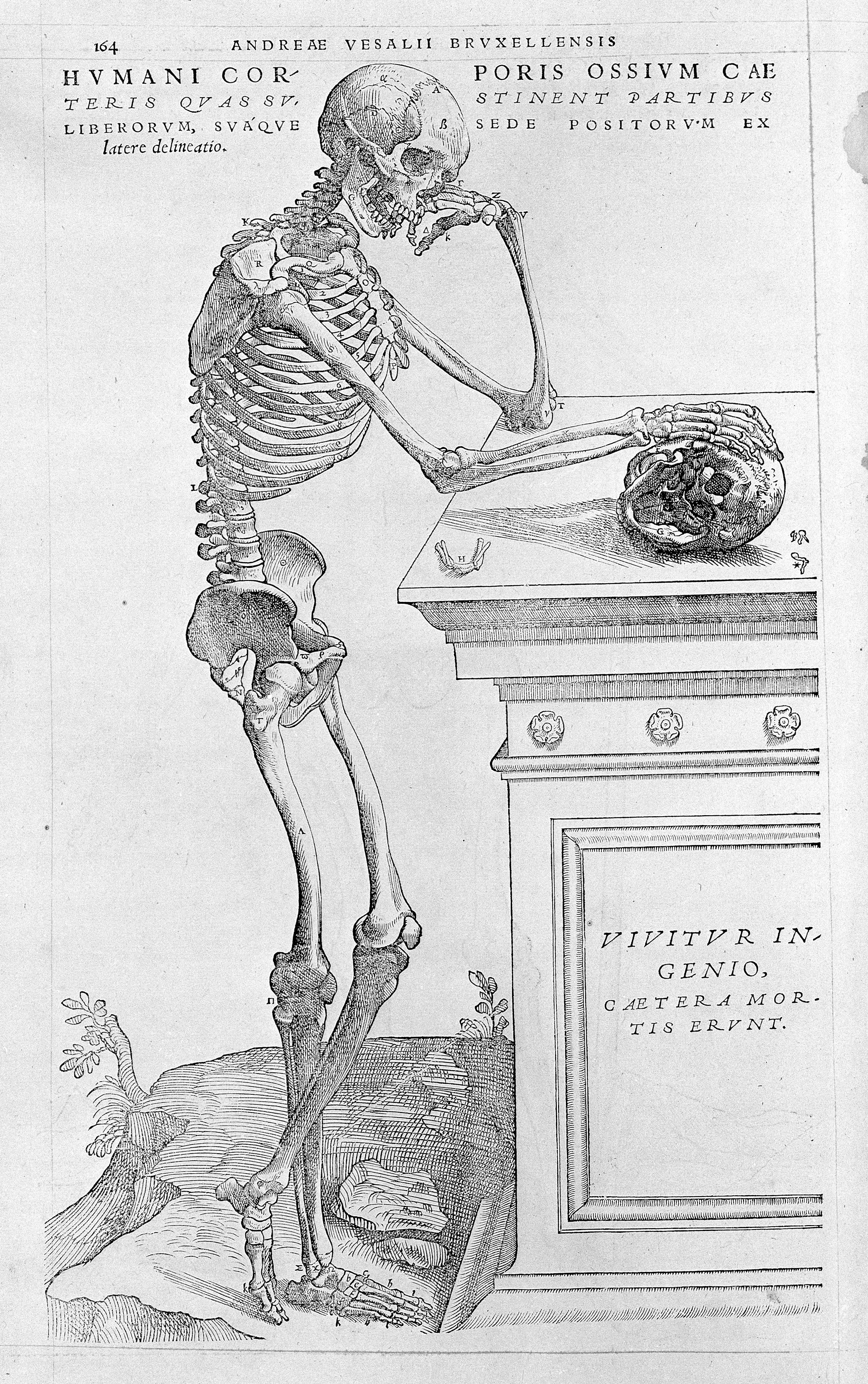 Leaning skeleton. Rare Books Keywords: Anatomy; Vesalius, Andreas